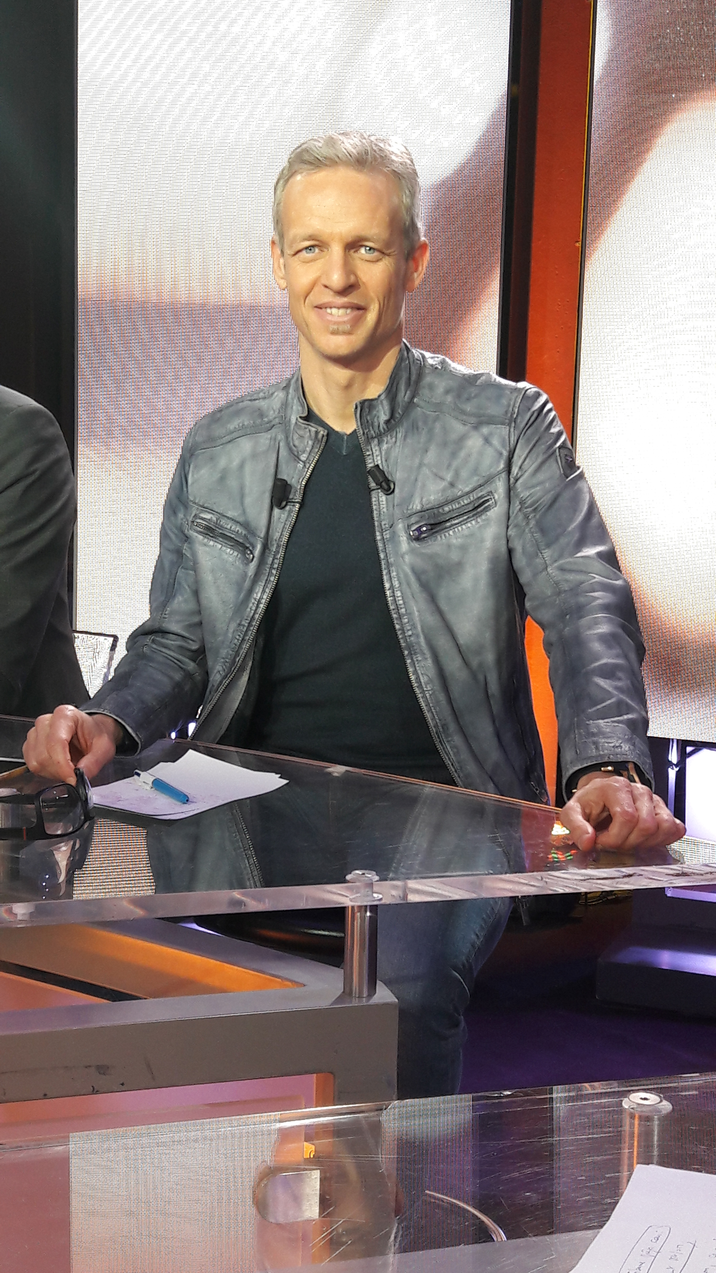 Bruno Irles sur le plateau du Late Football Club en février 2018